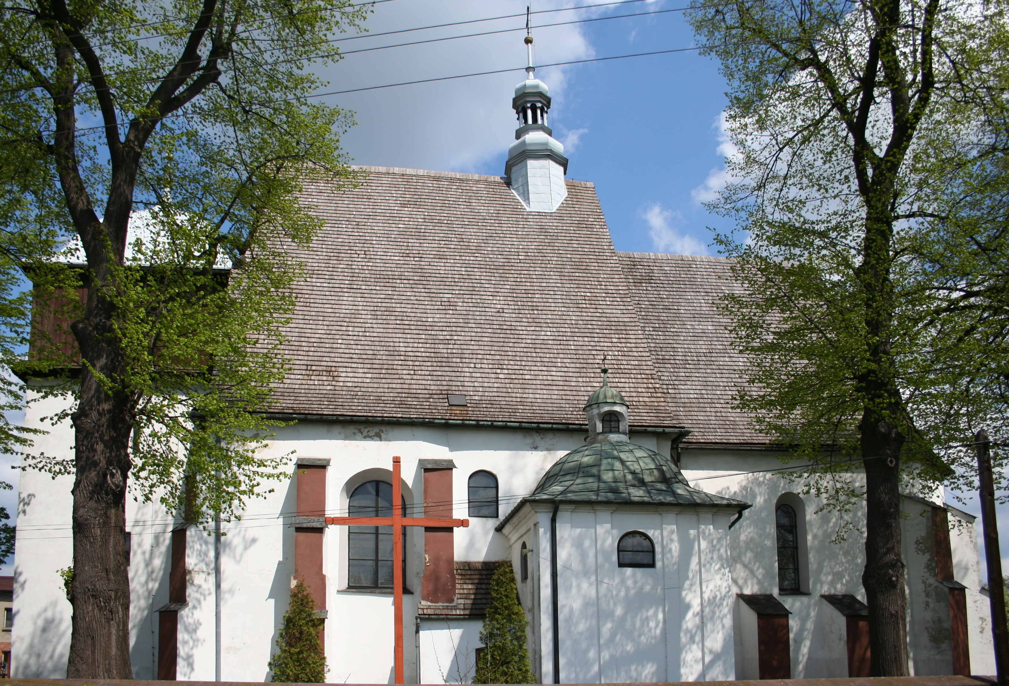 Kościół Marii Magdaleny w Koziegłowach, Polska, województwo śląskie, powiat myszkowski